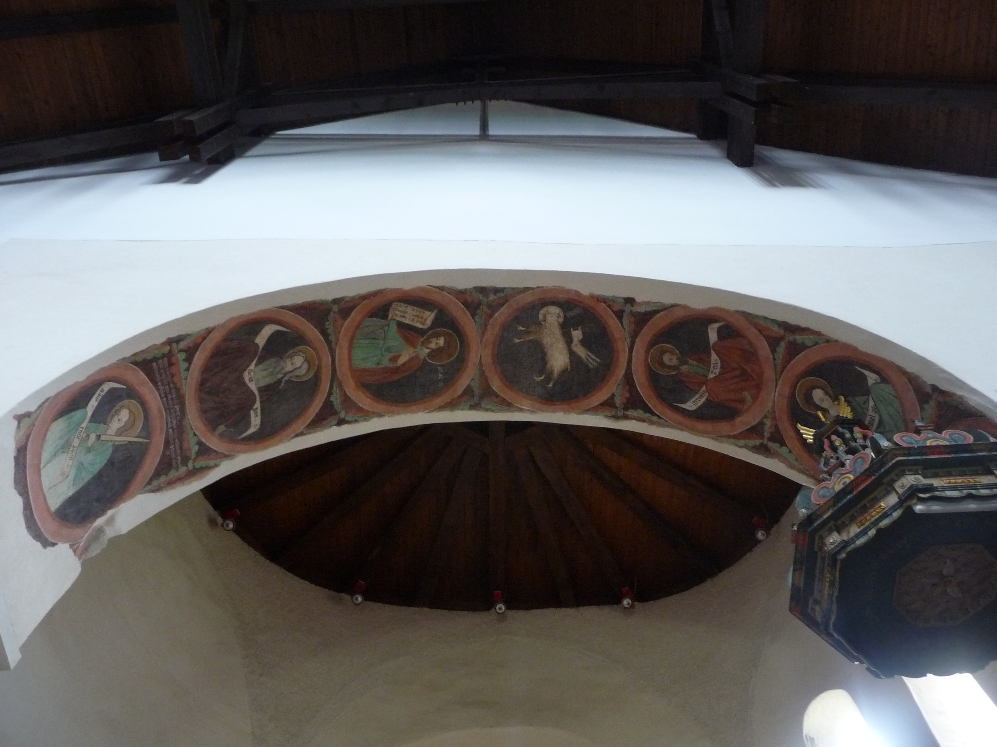 A szalonnai református templom diadalíve